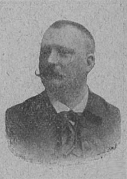 František Roček (1860-1928), rakouský a český právník a politik